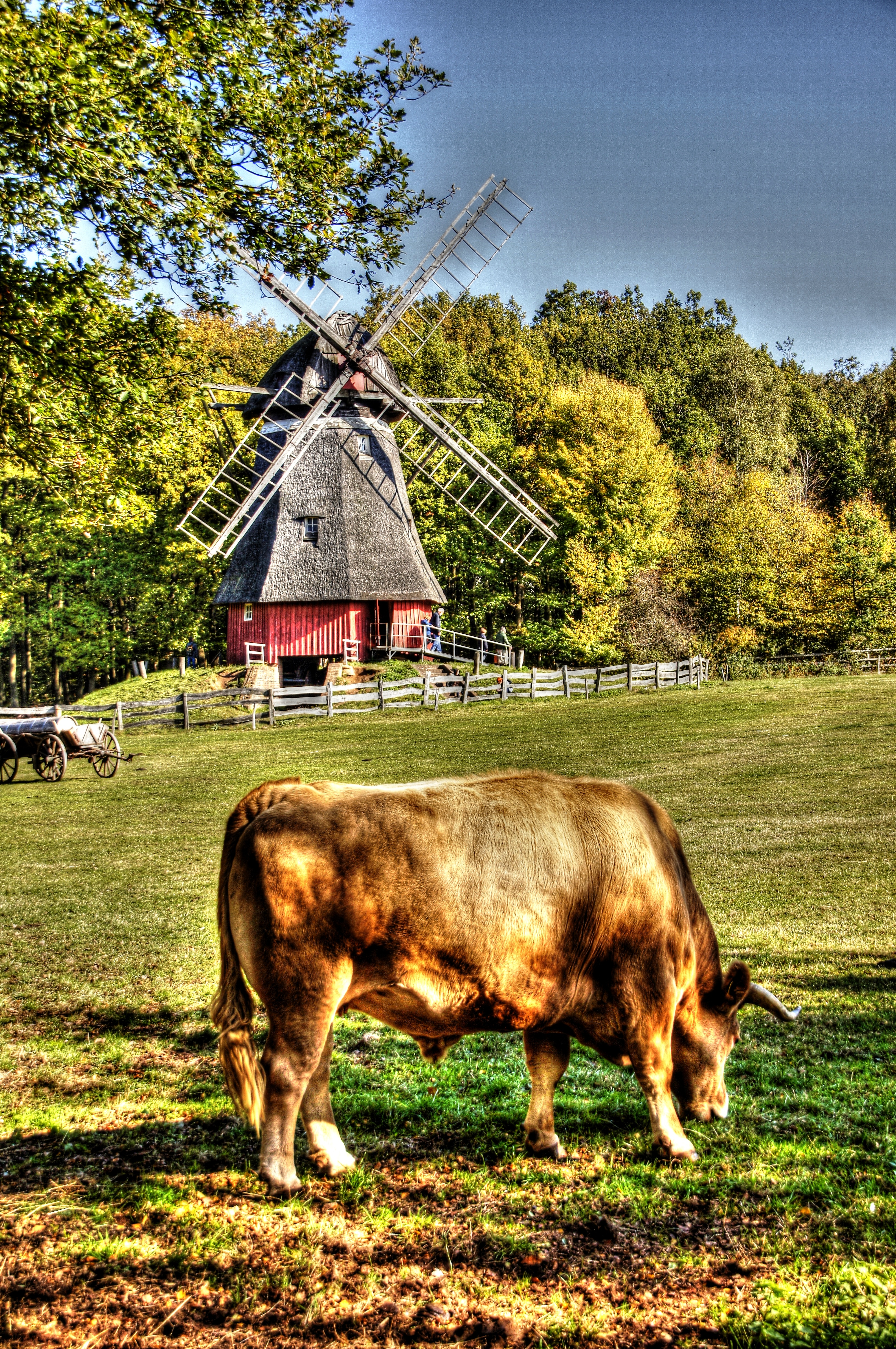 Glan-Donnersberger Rind[1], Freilichtmuseum Kommern bei Mechernich in der Eifel, Kappenwindmühle aus Cantrup und Rindvieh